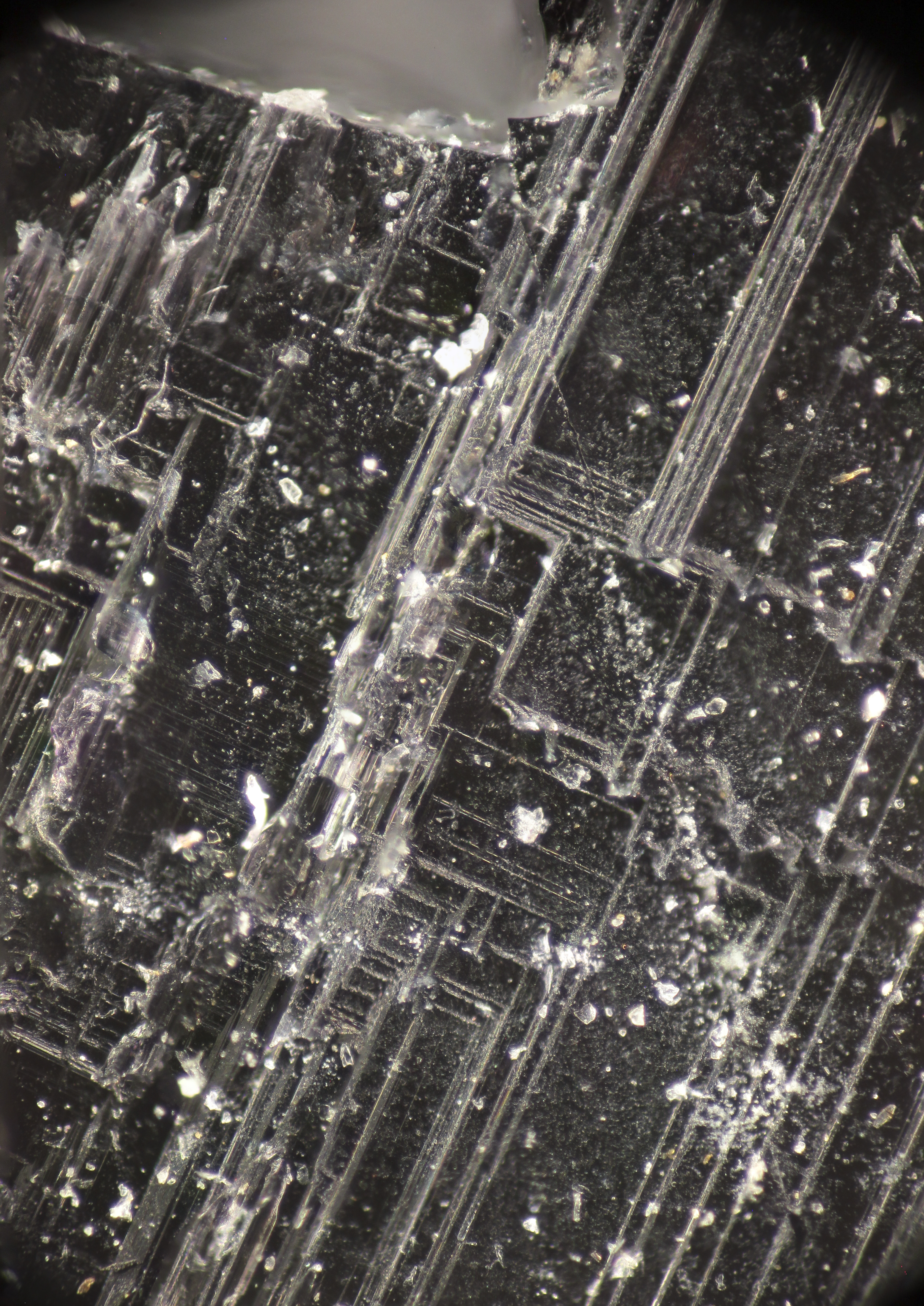 Photo prise au microscope x10